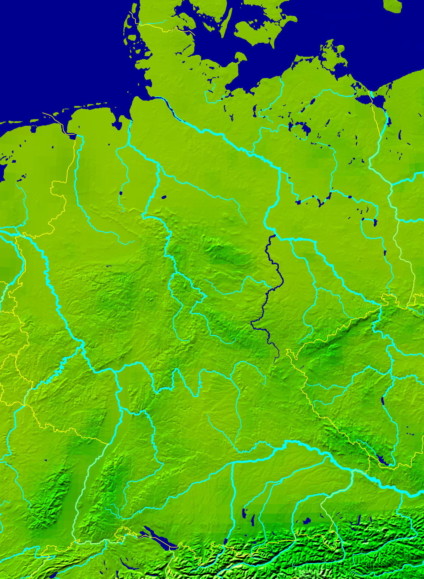 River Saale in Germany